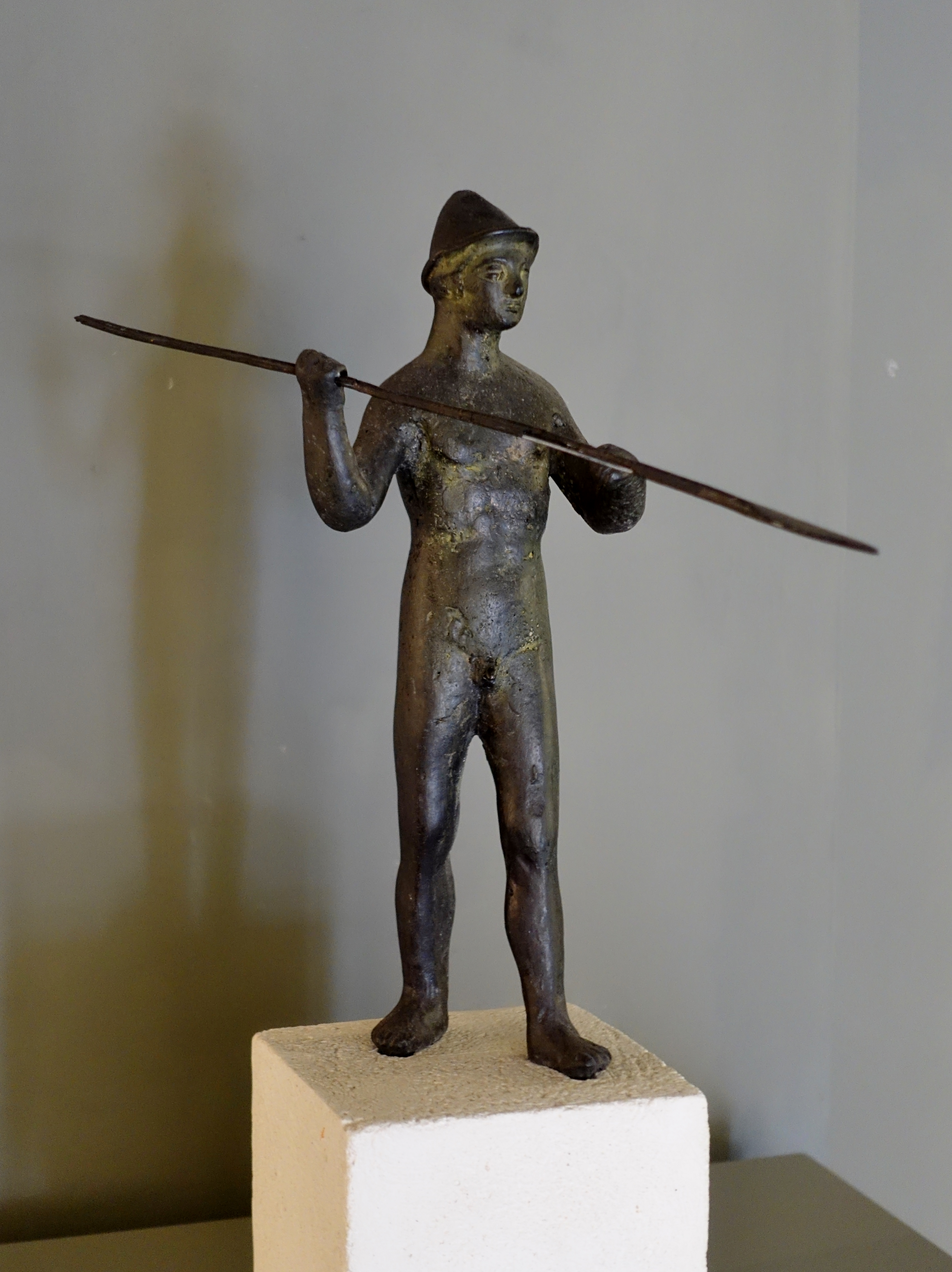 Krieger, 23cm hohe Bronzefigur, von der Marina de sa Punta (Guerrer de sa Marina de sa Punta) nordwestlich von S’Illot im Besucherzentrum des talaiotischen Dorfes von S’Illot (Poblat talaiòtic de s’Illot), Gemeinde Sant Llorenç des Cardassar, Mallorca, Spanien